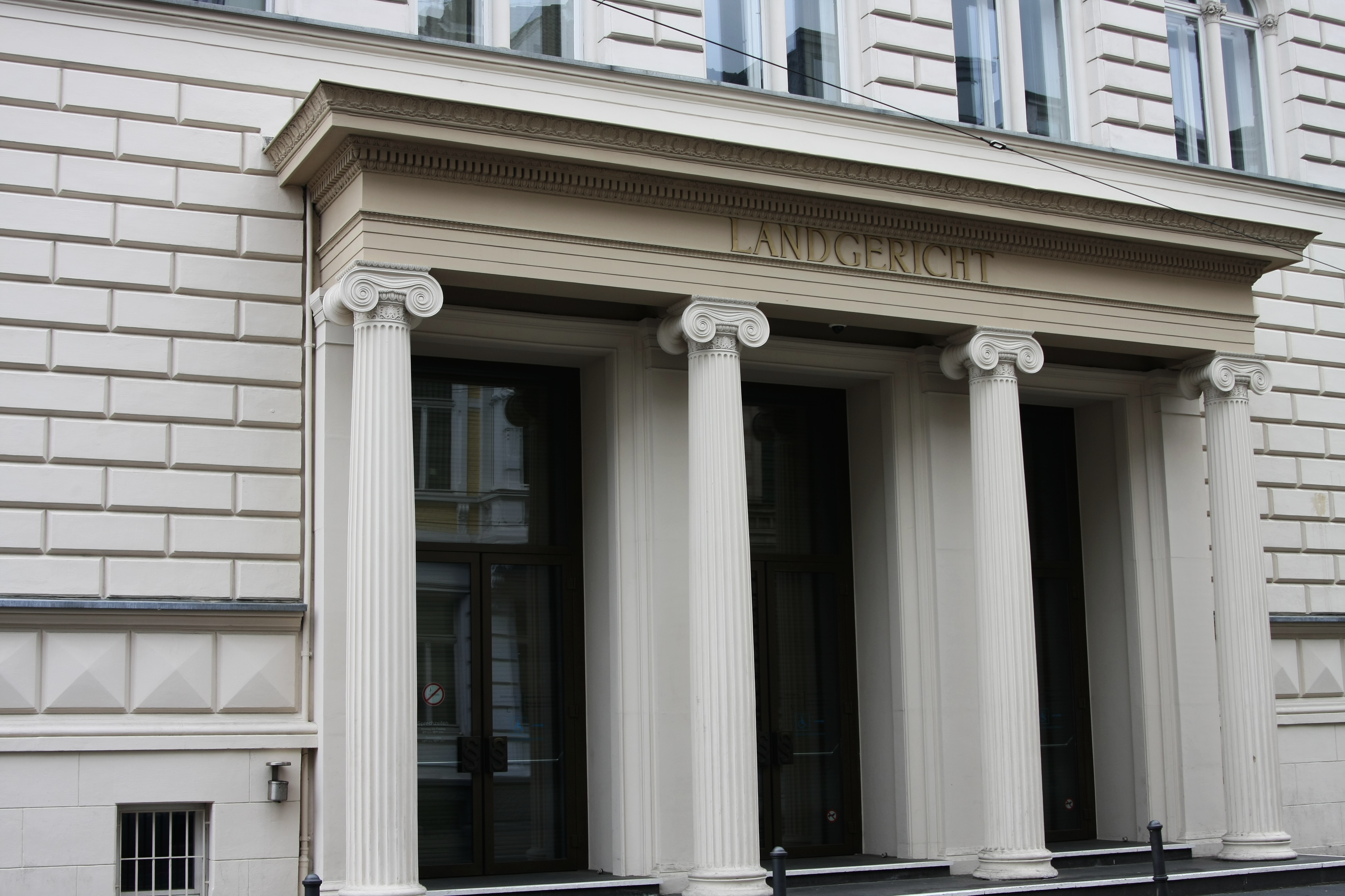 Landgericht Bonn, Wilhelmstraße 21, Bonn-Zentrum: Eingangsportal